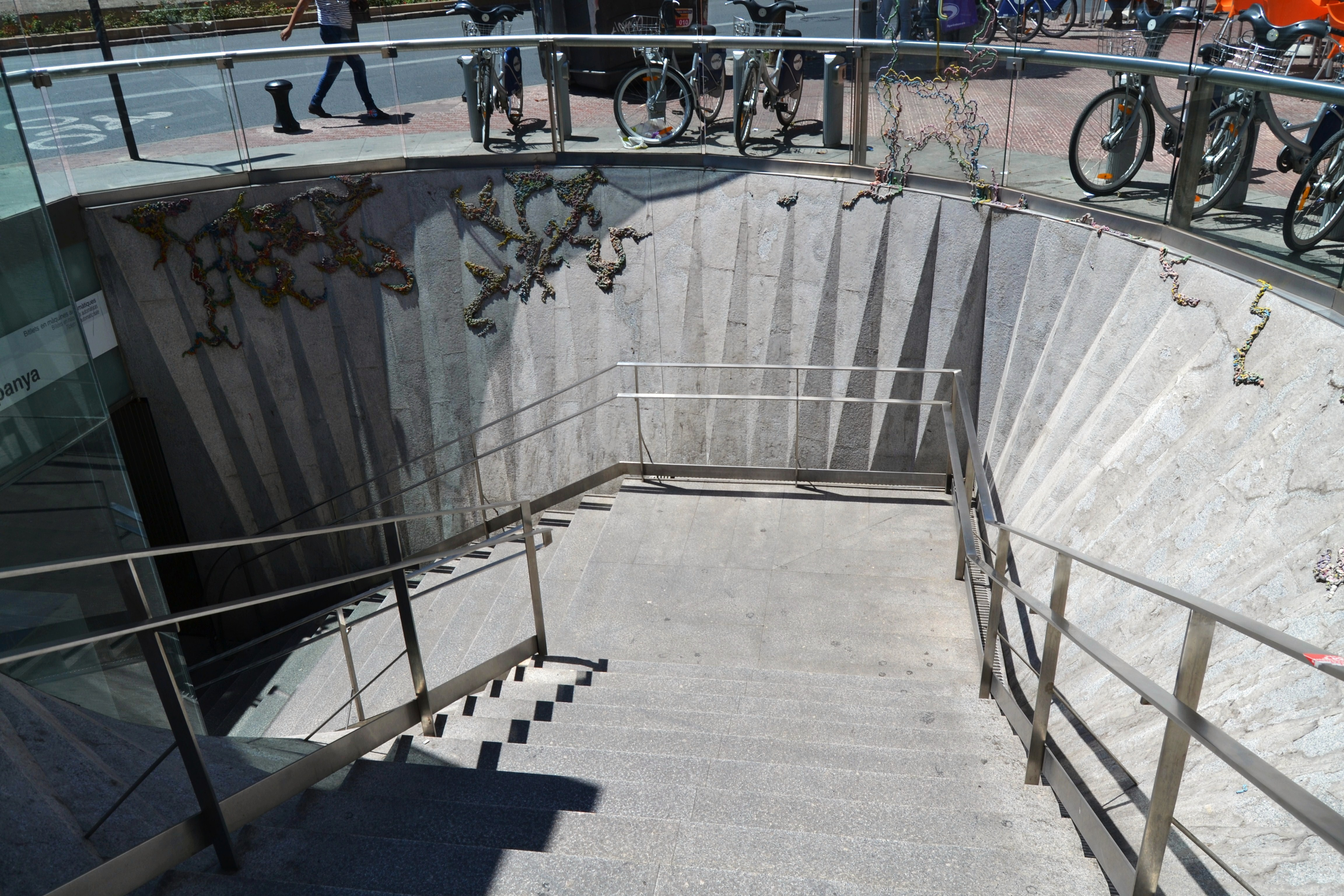 Escales de l'estació de plaça d'Espanya, València.